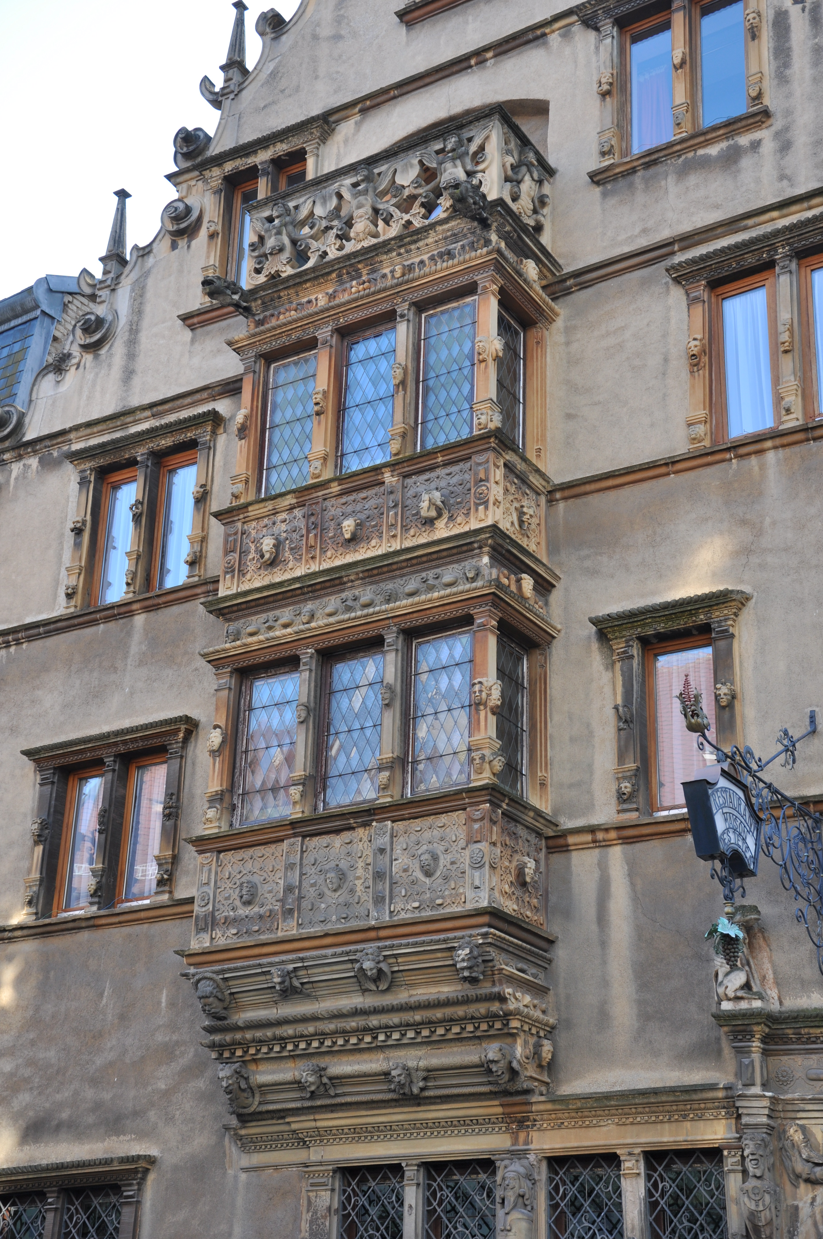 19 Rue des Têtes; Restaurant La Maison des Têtes, Colmar, Alsace, France